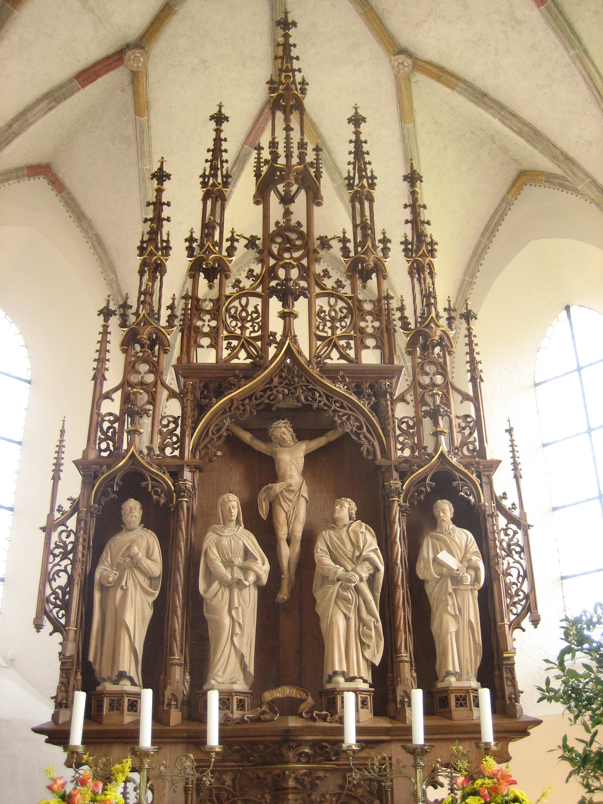 Neugotischer Altar mit Deësis-Gruppe sowie Petrus und Paulus in der evangelisch-lutherischen Pfarrkirche Unser Frauen in Woringen, Leonhard Vogt, 1892.